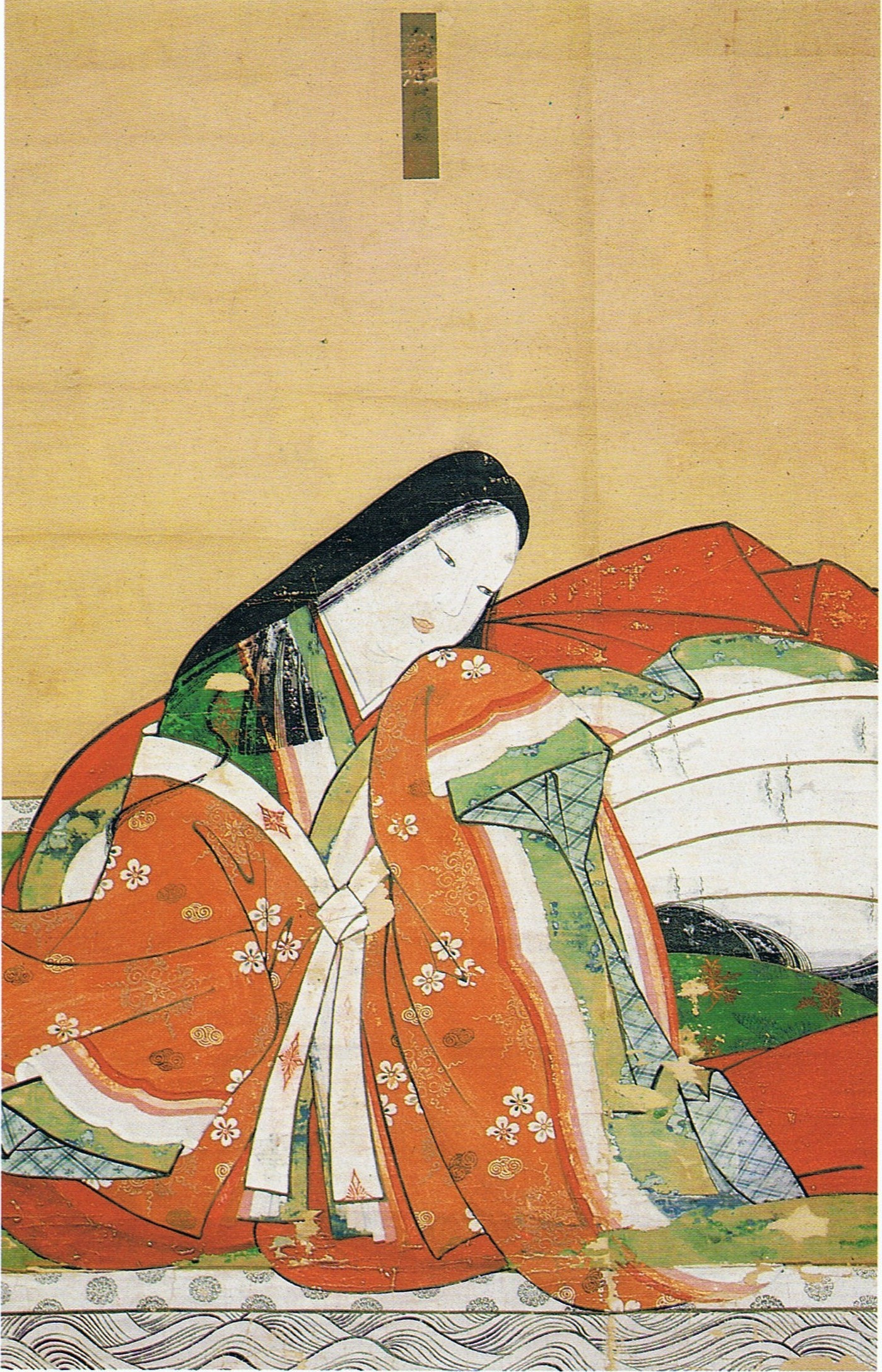 藤原輔子画像（平重衡妻）